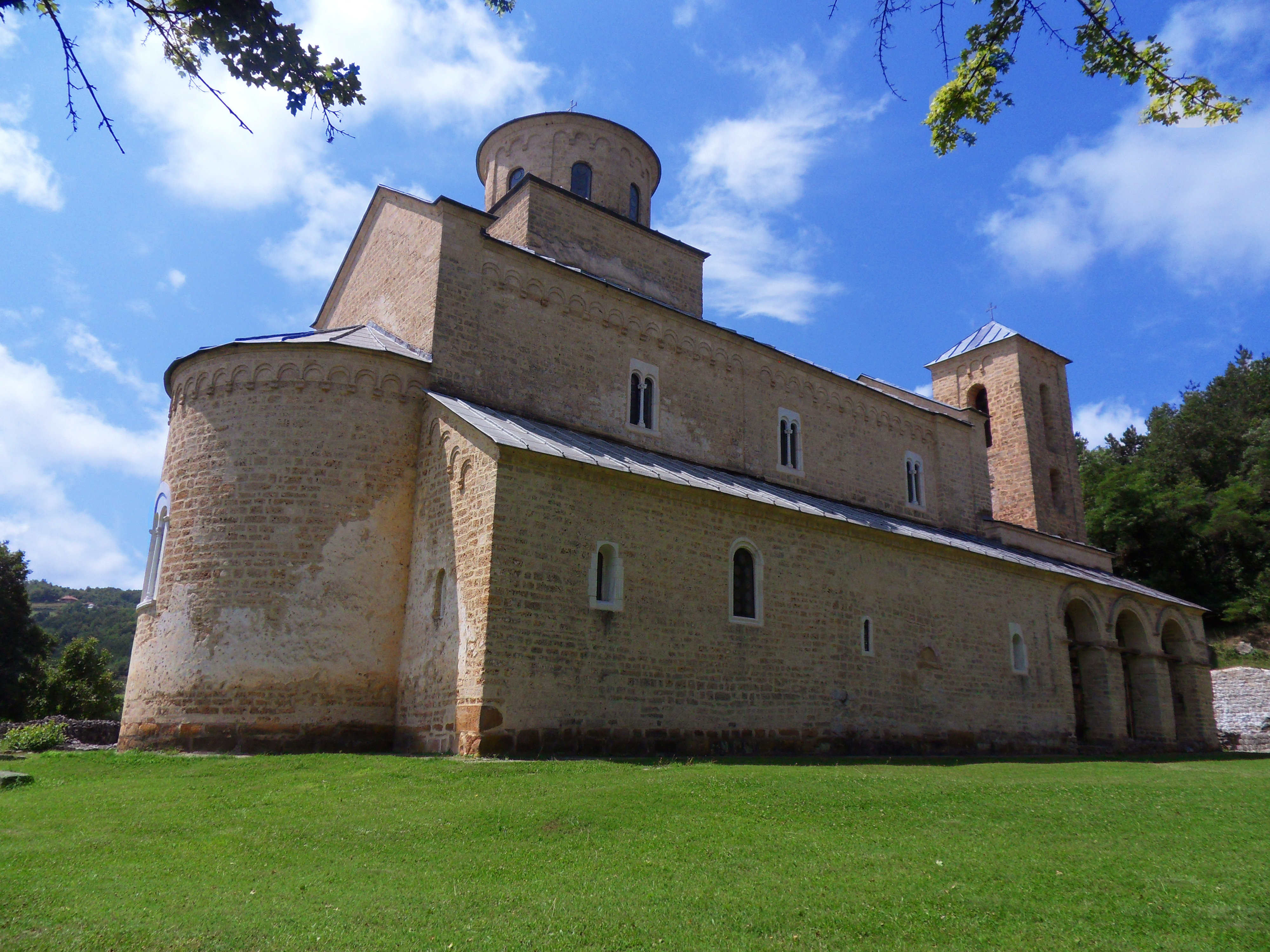 Sopocani Monastery